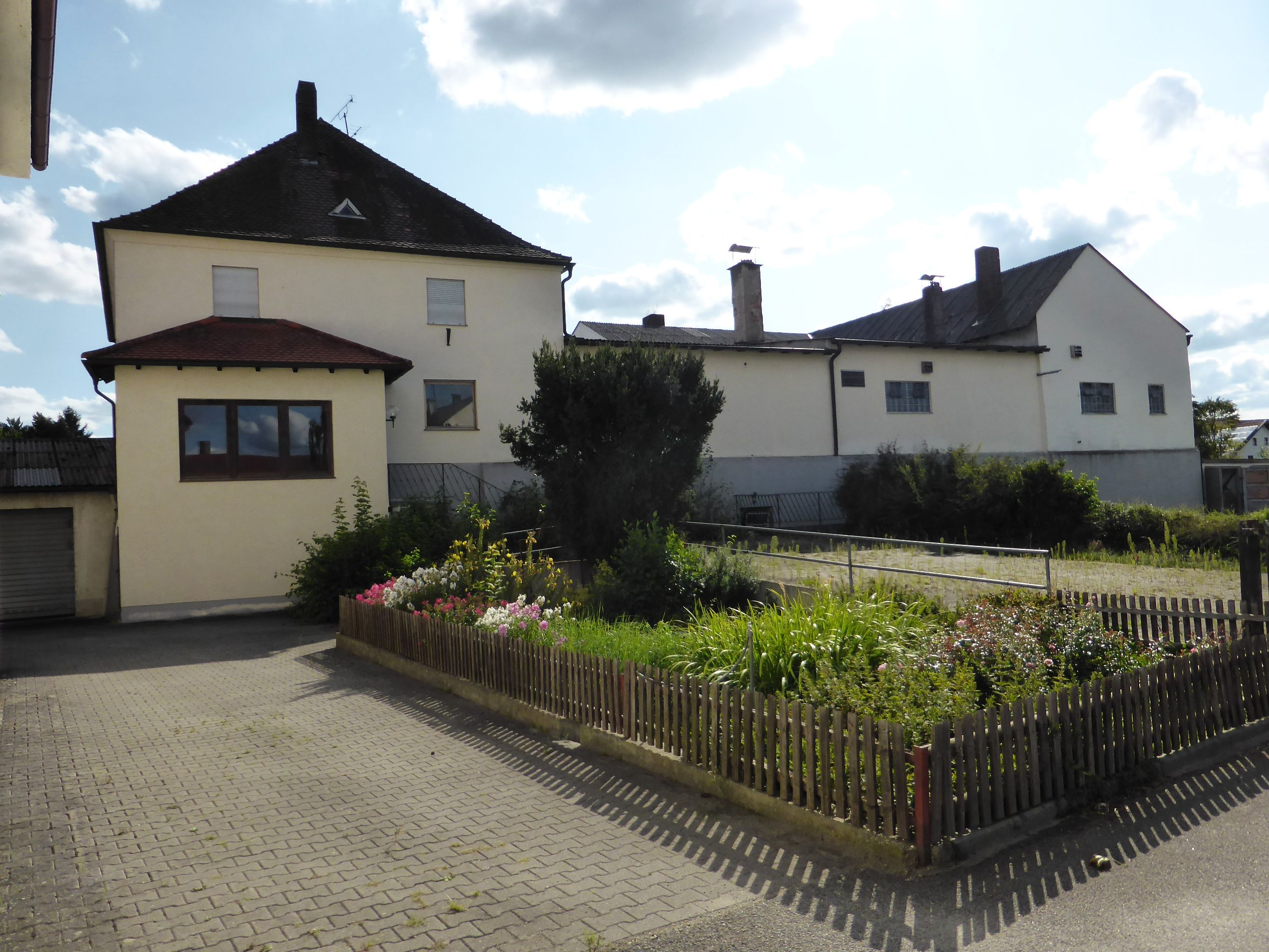 Laberweinting (ehemalige Lage des Schlosses Laberweinting)